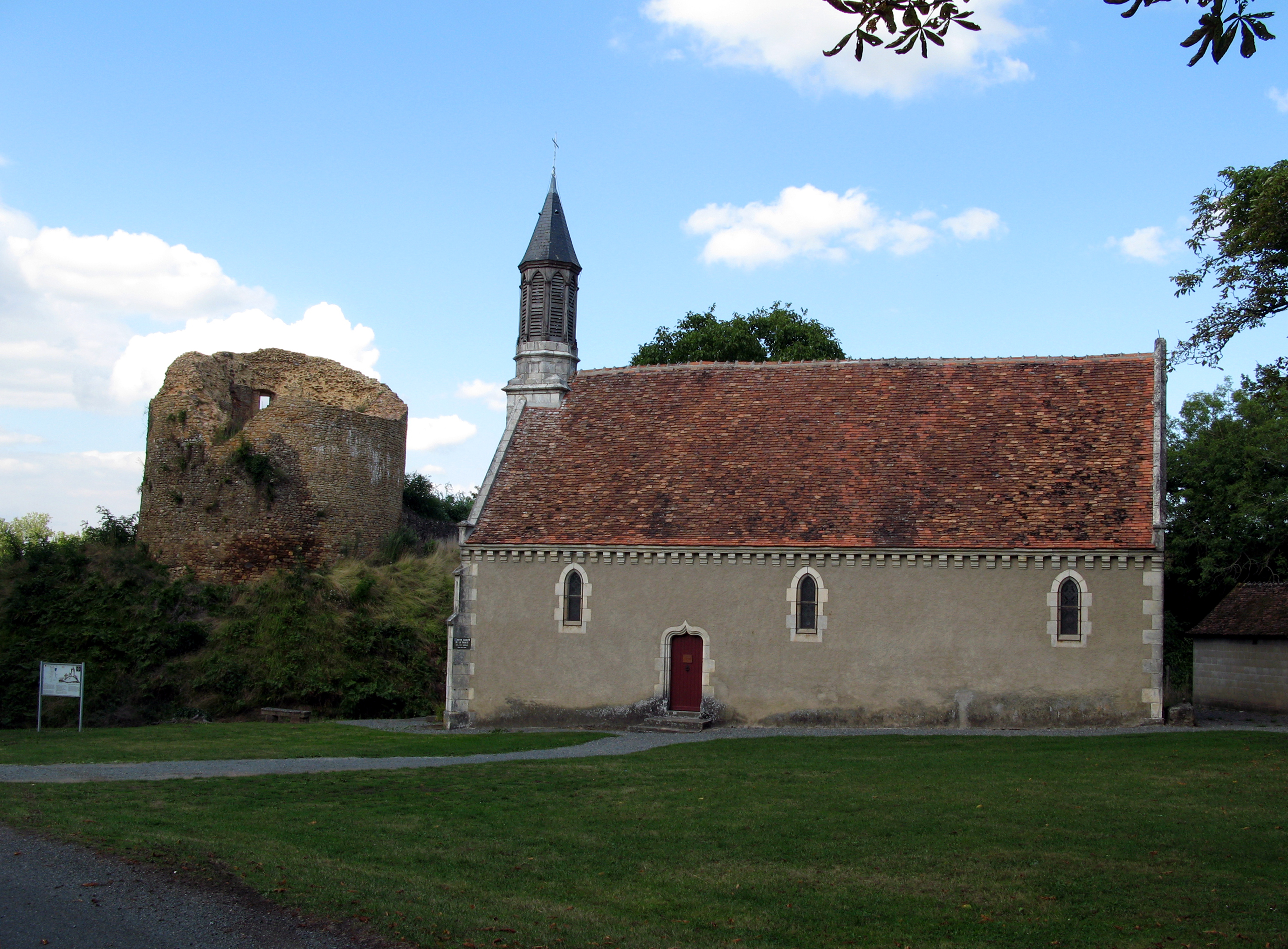 Cluis (Indre, France) - A Cluis-Dessous, vestiges d'une tour et chapelle Notre-Dame de la Trinité. . . .